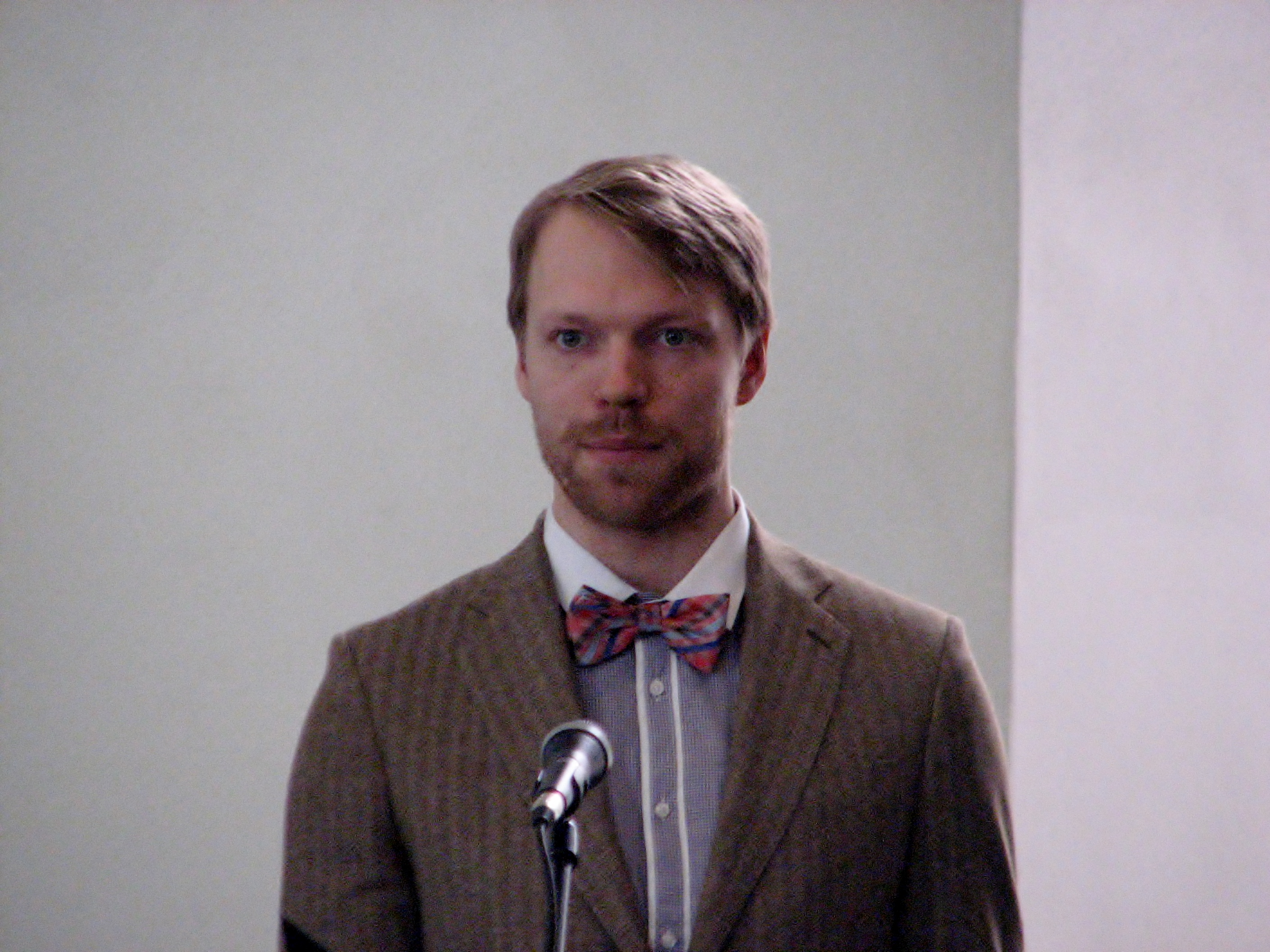 Mihkel Kabel esinemas karjääri- ja õppenõustamisspetsialistide tunnustusüritusel